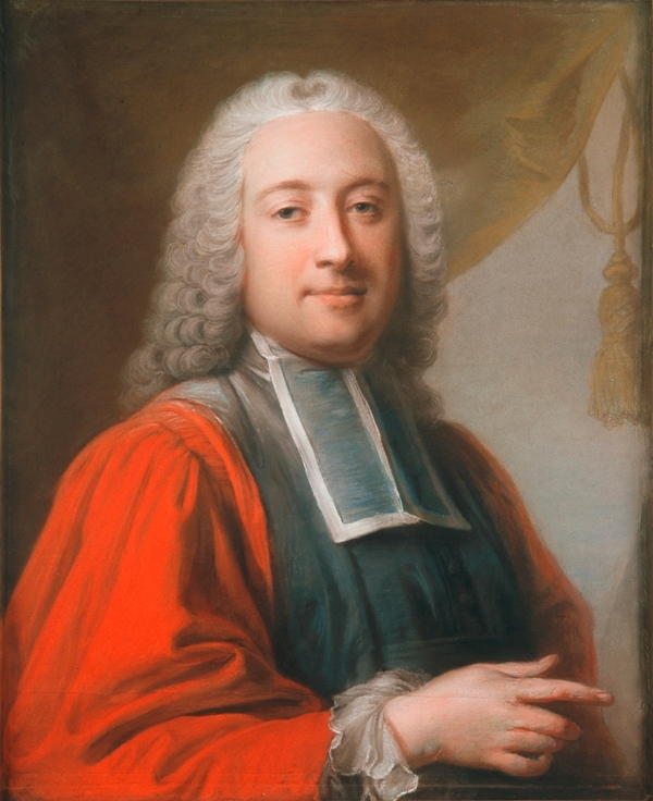 Paul-Romain Chaperon, portrait de François-Armand de Saige, v. 1760, pastel. Bordeaux, Musée des Arts décoratifs et du Design.